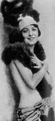 L'attrice e cantante italiana Isa Bluette